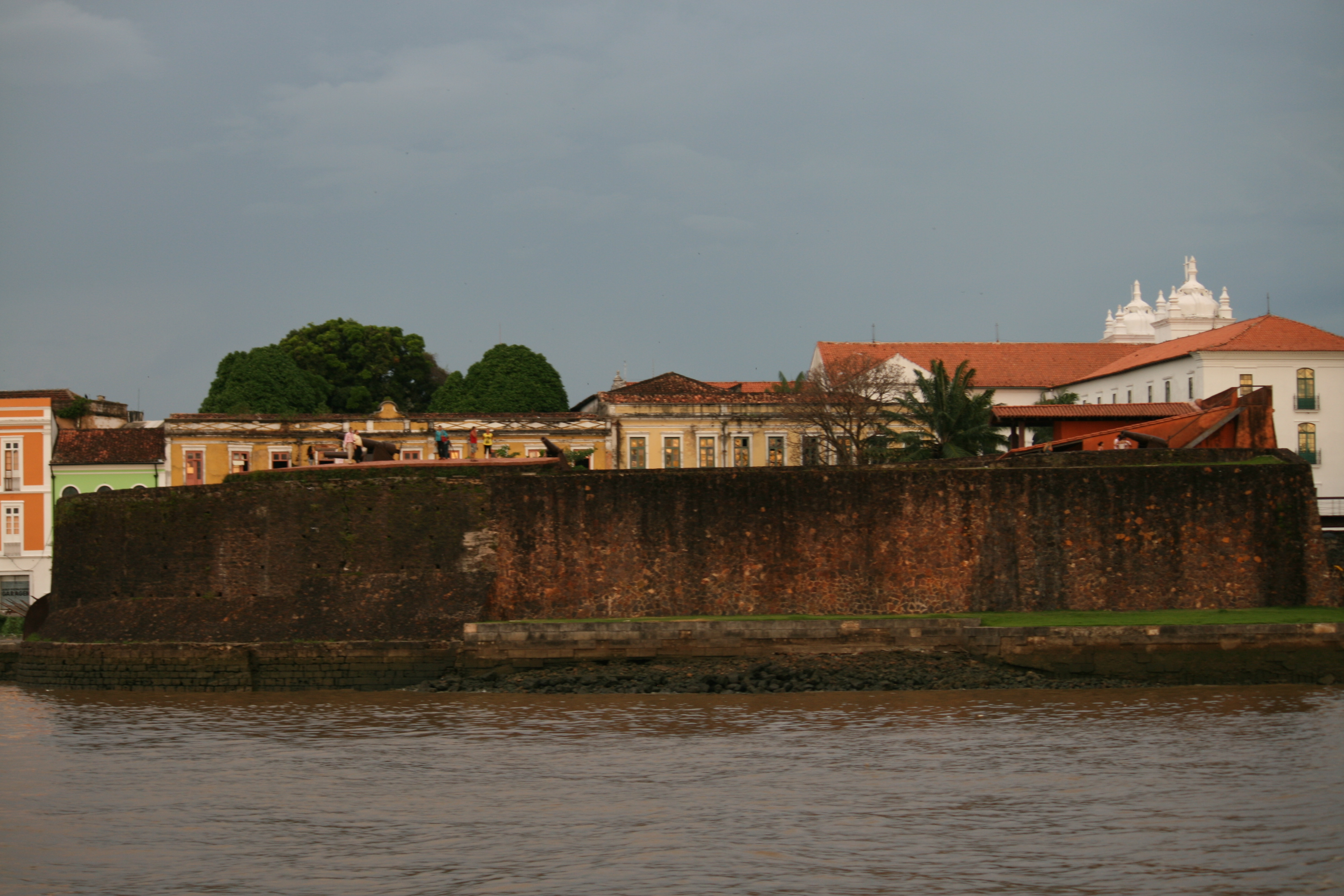 Marco da fundação da cidade de Belém, onde os portugueses desembarcaram no dia 12 de janeiro de 1616. Foto: Bruno Huberman